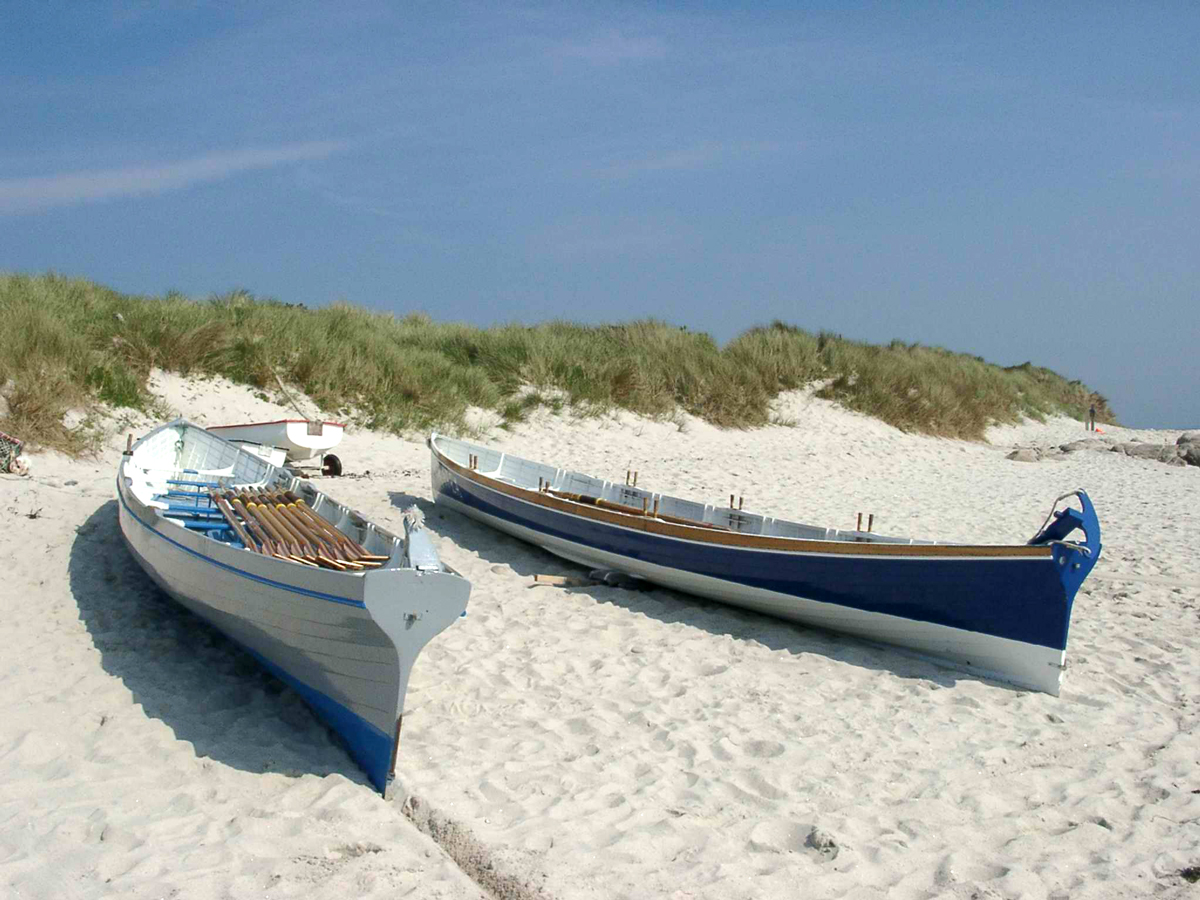 Description : Deux gigs à l'ile de Saint Martin (Scilly) Lieu : Saint Martin (Scilly / Royaume Uni) Date : 2004 Auteur : Pline Photo personnelle